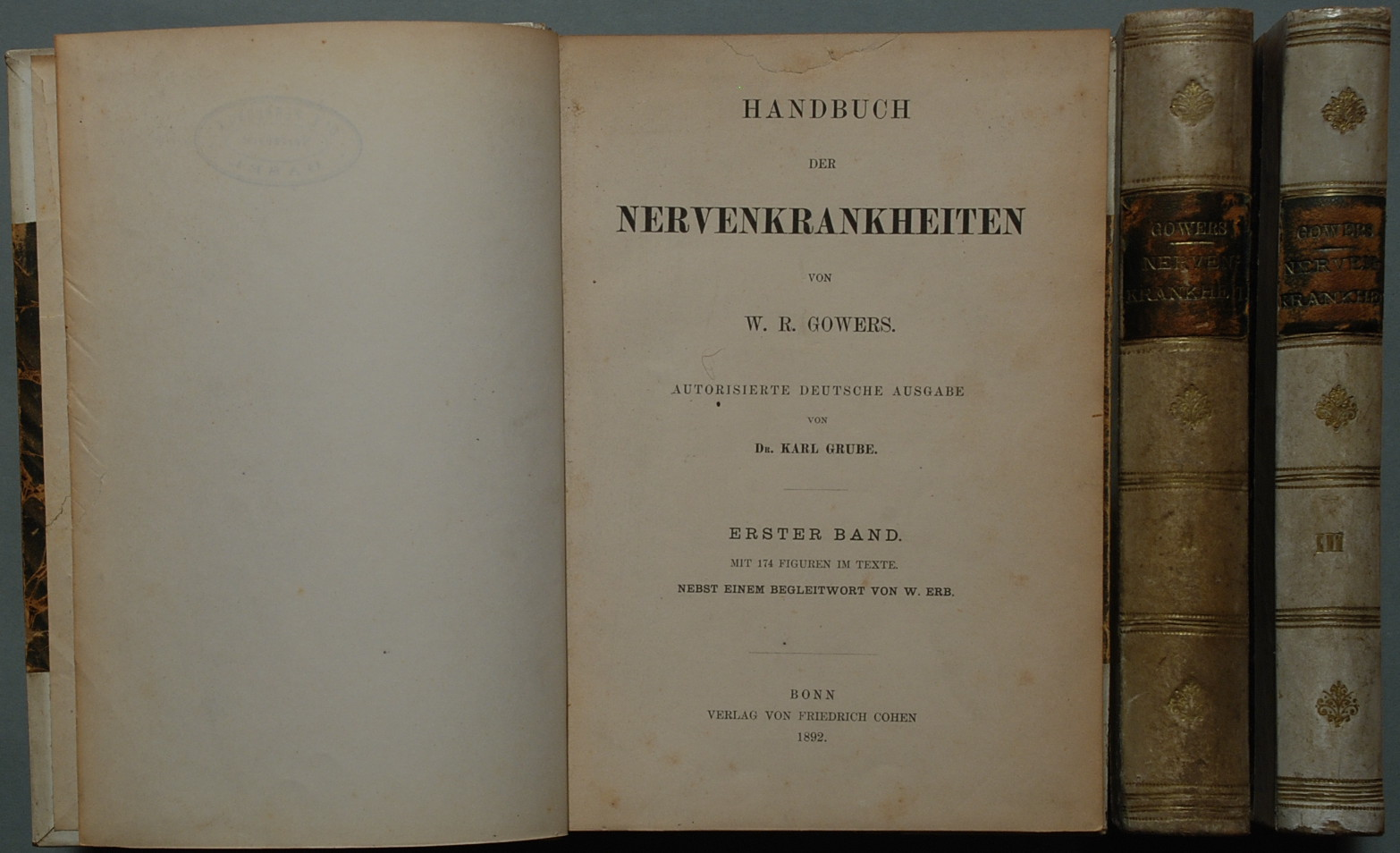 Deutsche Erstausgabe Für das Lichtbild